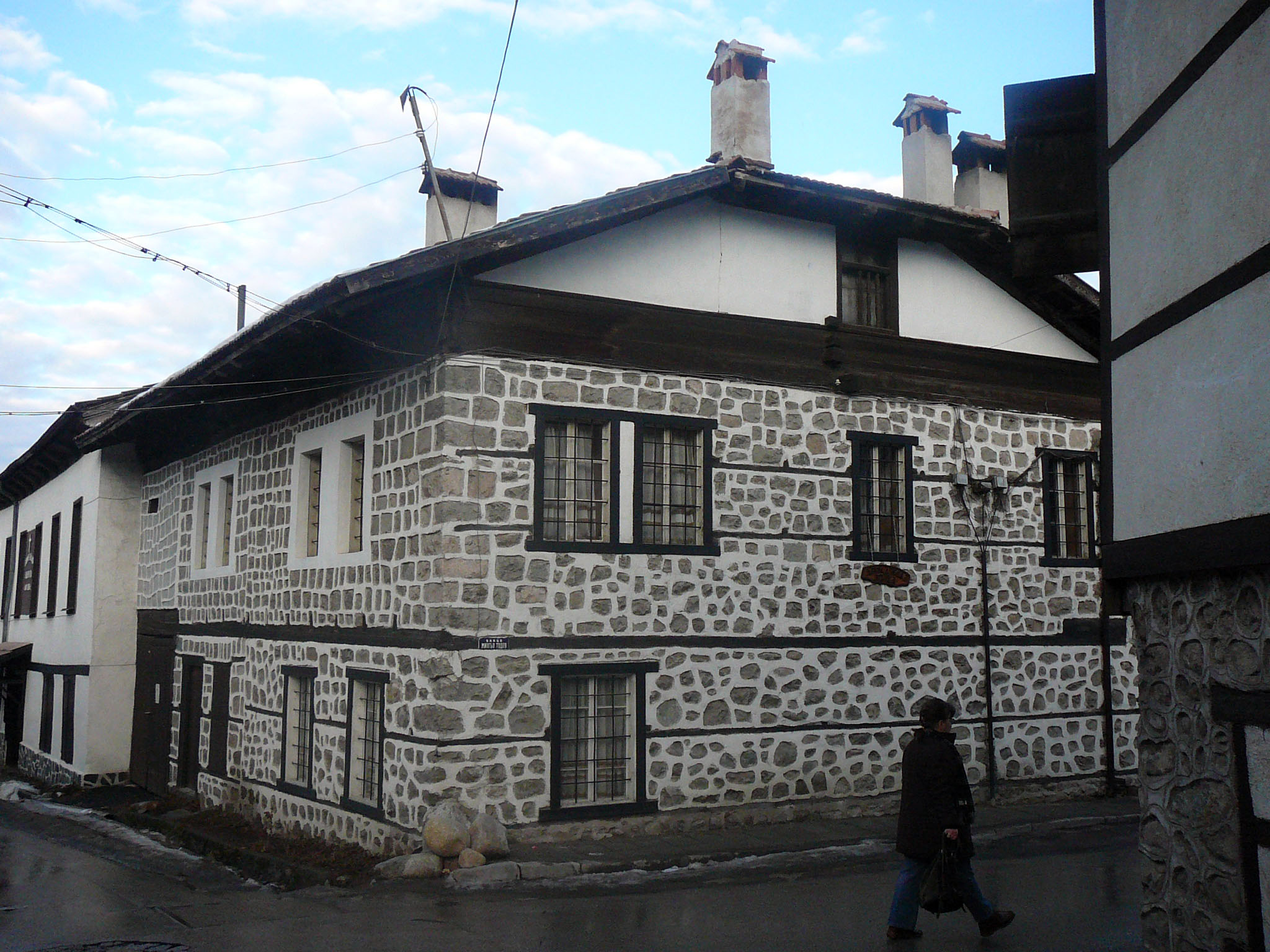 Bansko,Bulgaria